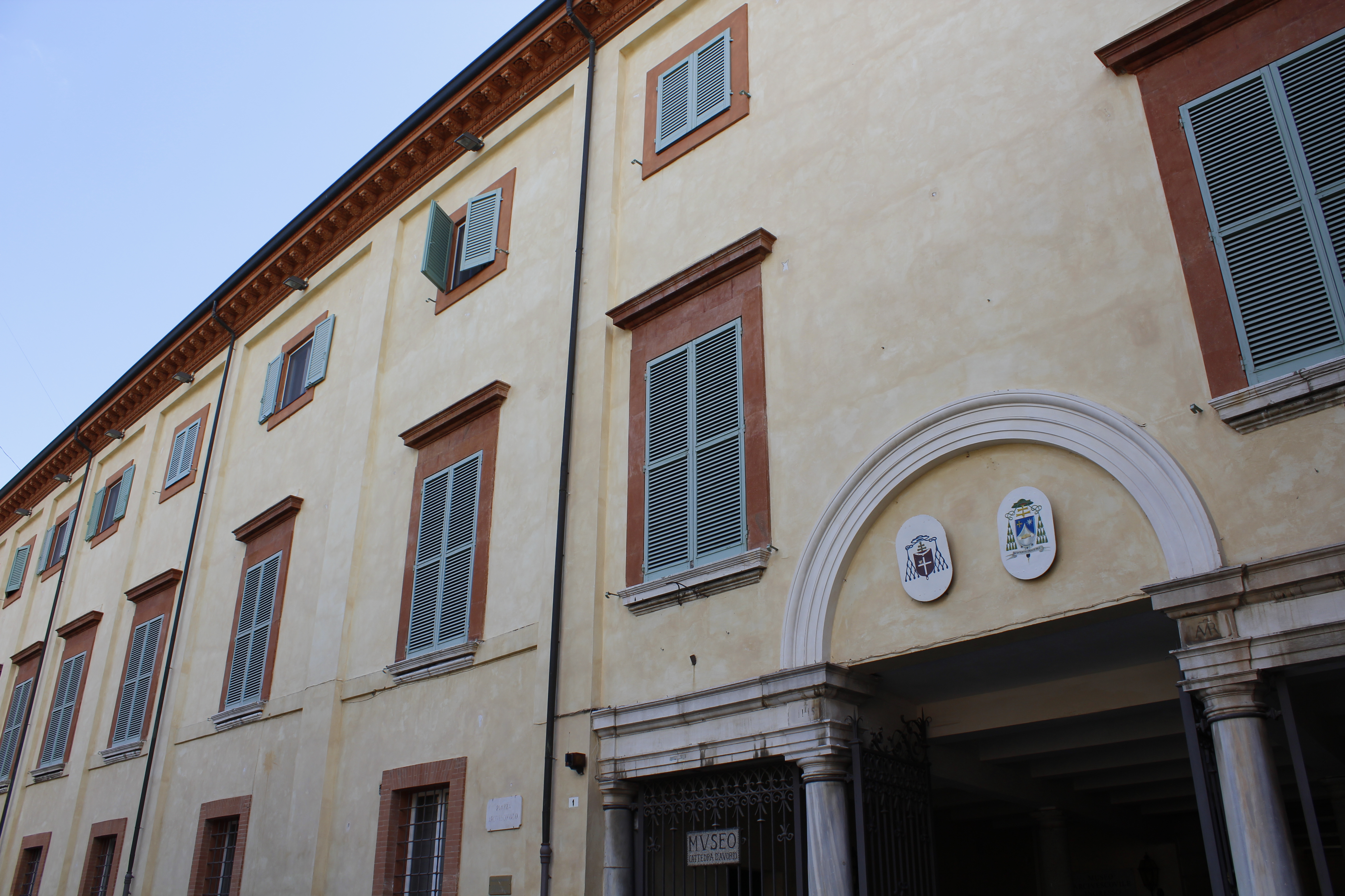 Museo arcivescovile, Ravenna